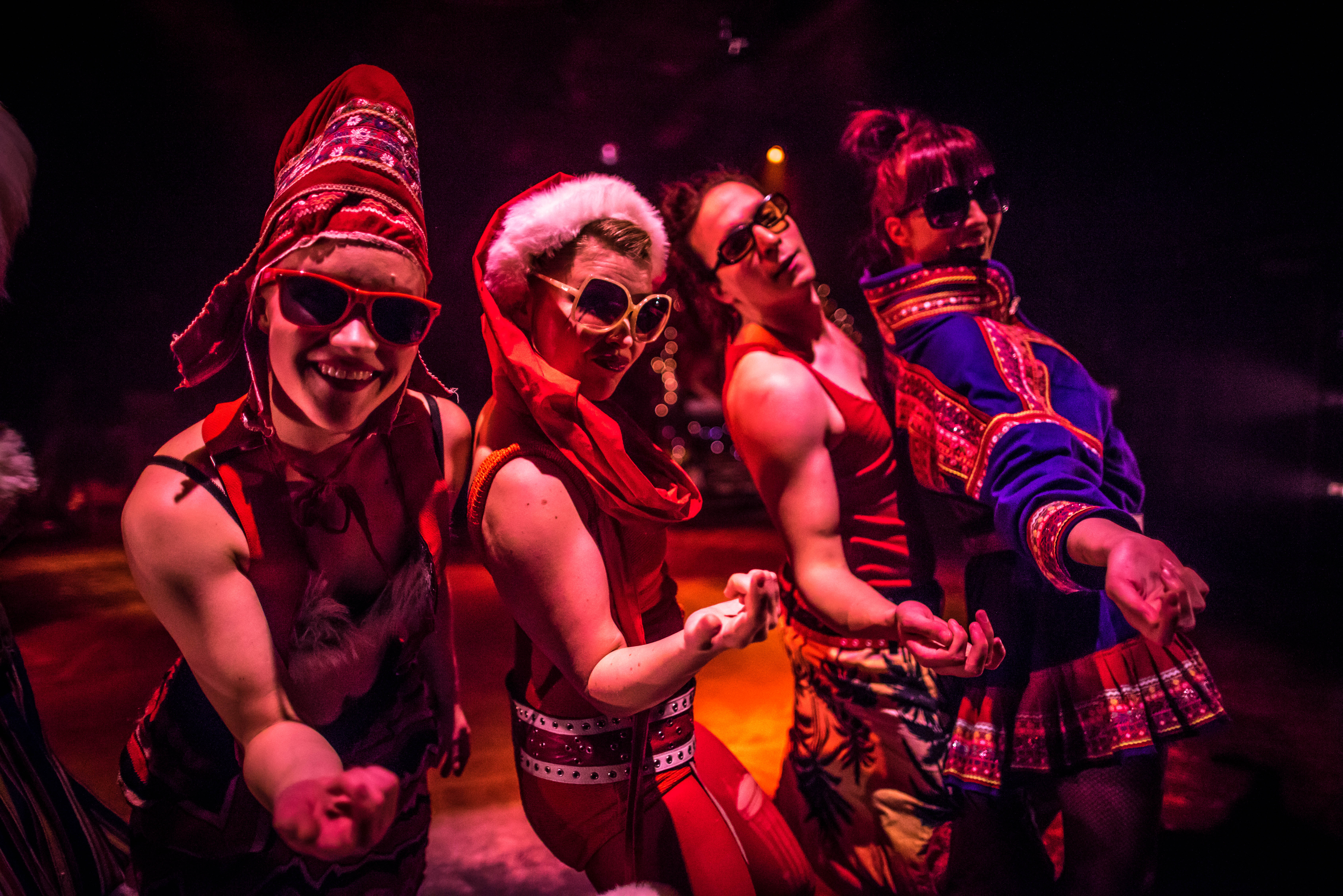 Karja Arktisessa Paratiisissa kor. Matti Paloniemi